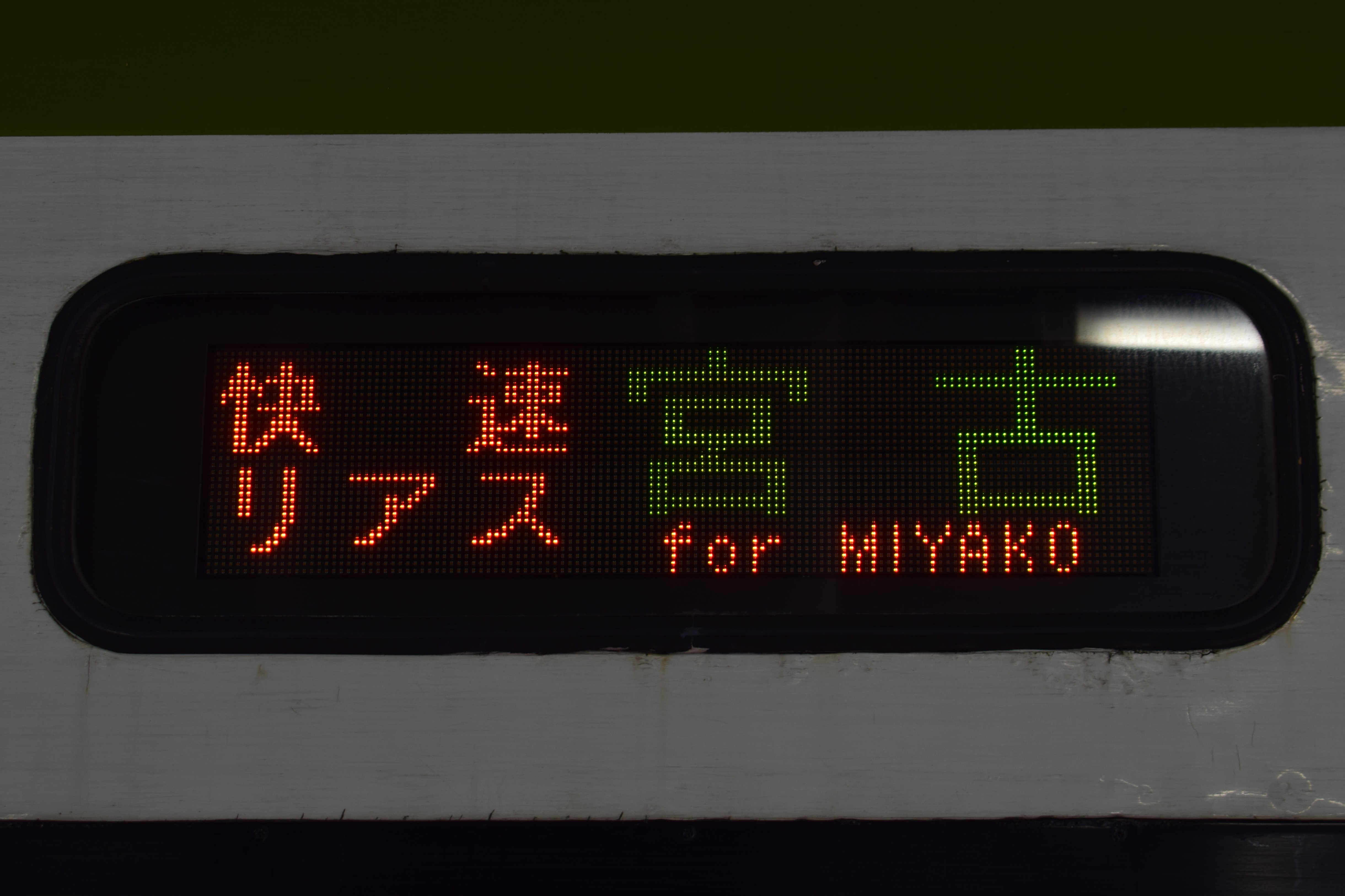 快速リアス 宮古行き